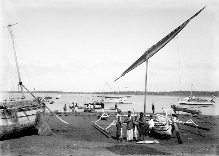 Repronegatief. Lombok, baai van Tandjoengloear met vlerkprauwen